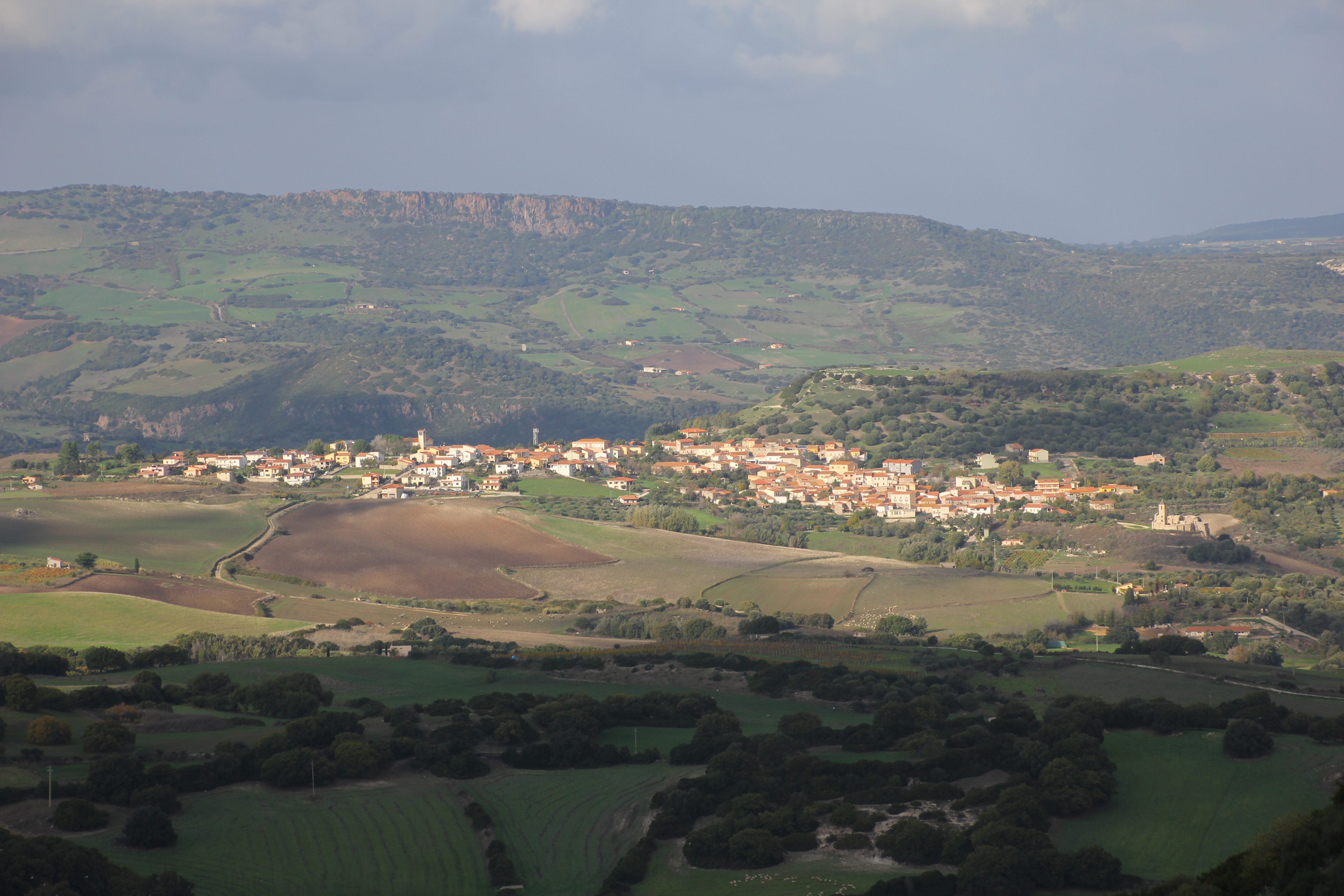 Panorama